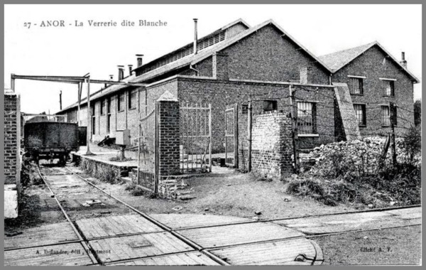 Anor verrerie blanche